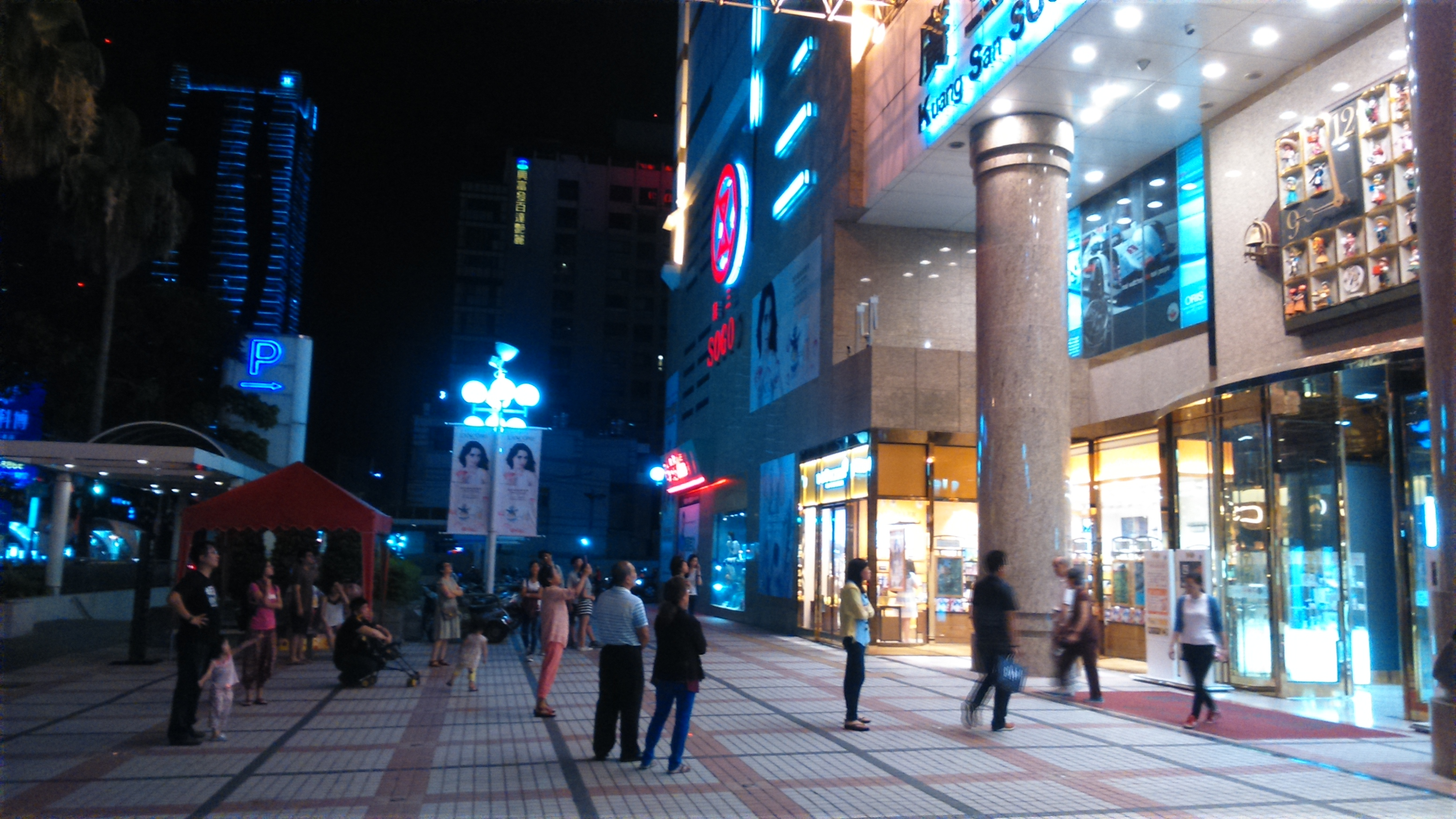 廣三SOGO百貨